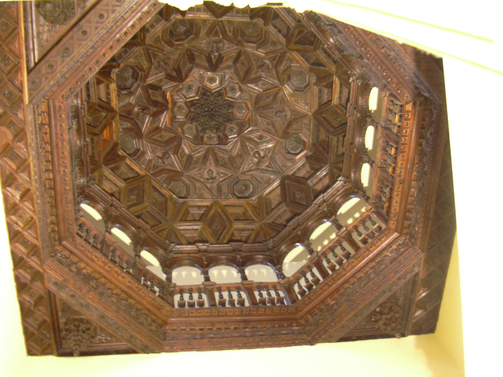 Casa de Miguel Donlope en Zaragoza Casa-palacio renacentista con techumbres mudéjares. Actualmente sede de la Real Maestranza de Caballería de Zaragoza. Techumbre mudéjar en hueco de escalera